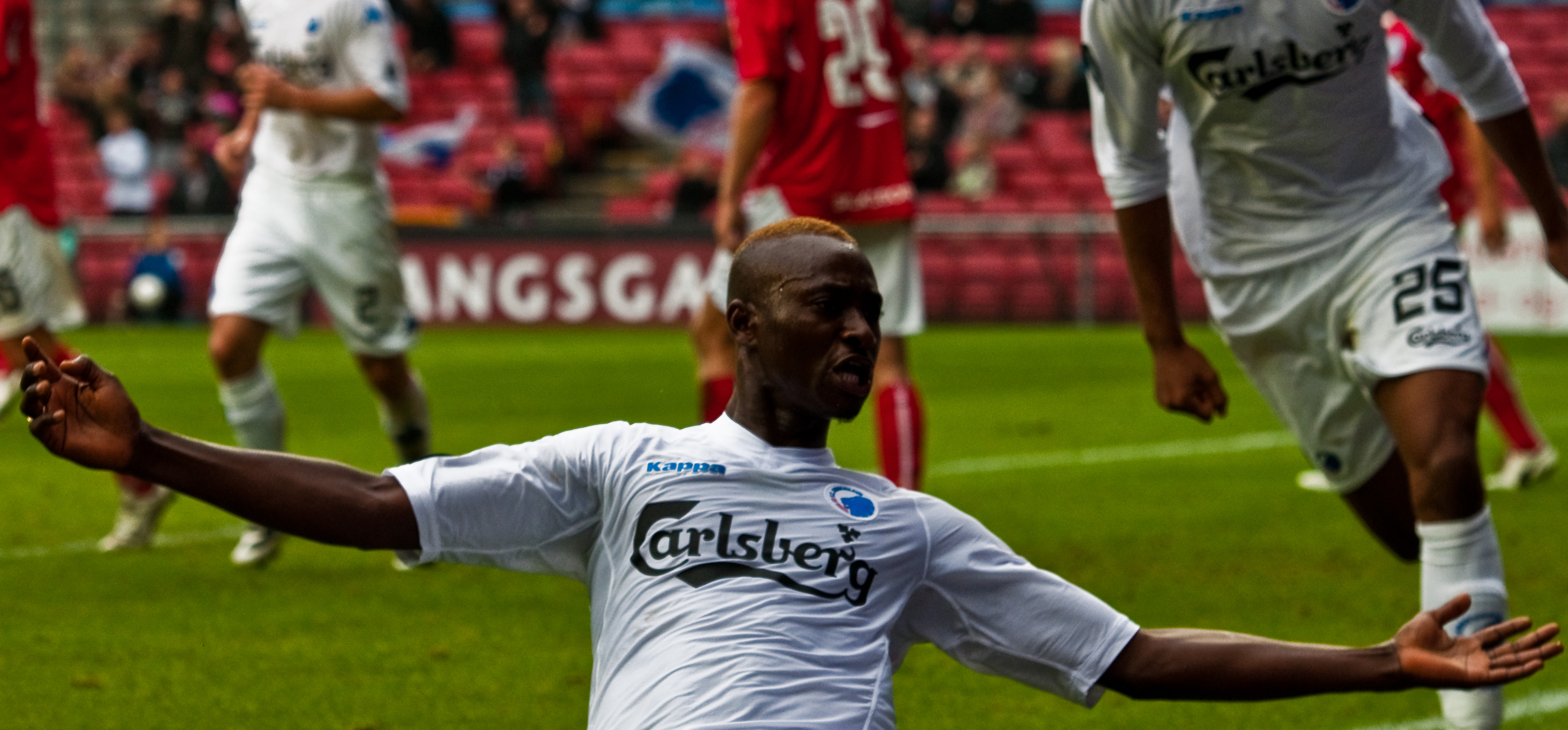 FCK vs. Silkeborg